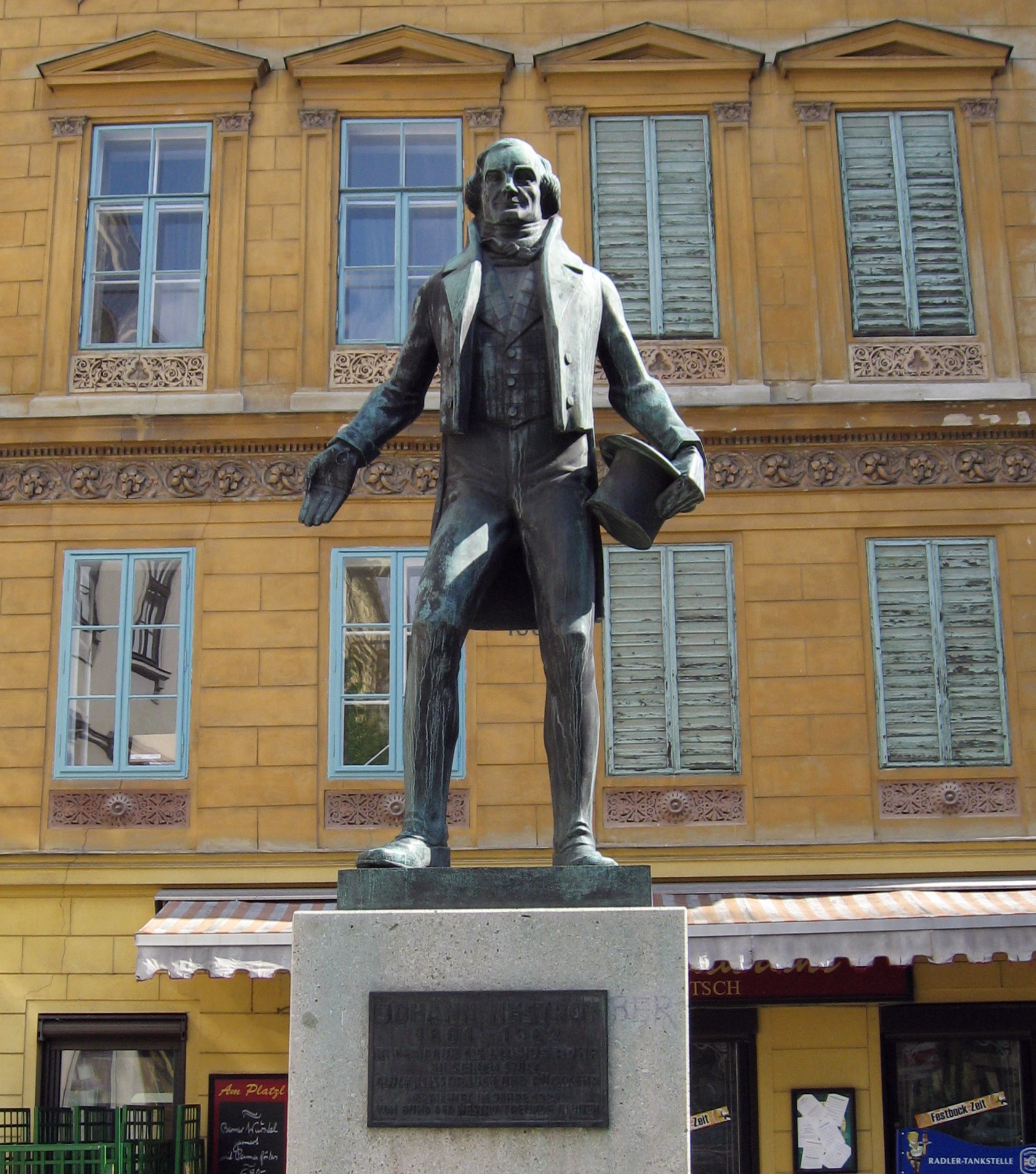 das Nestroy-Denkmal in der Leopoldstadt, in Wien